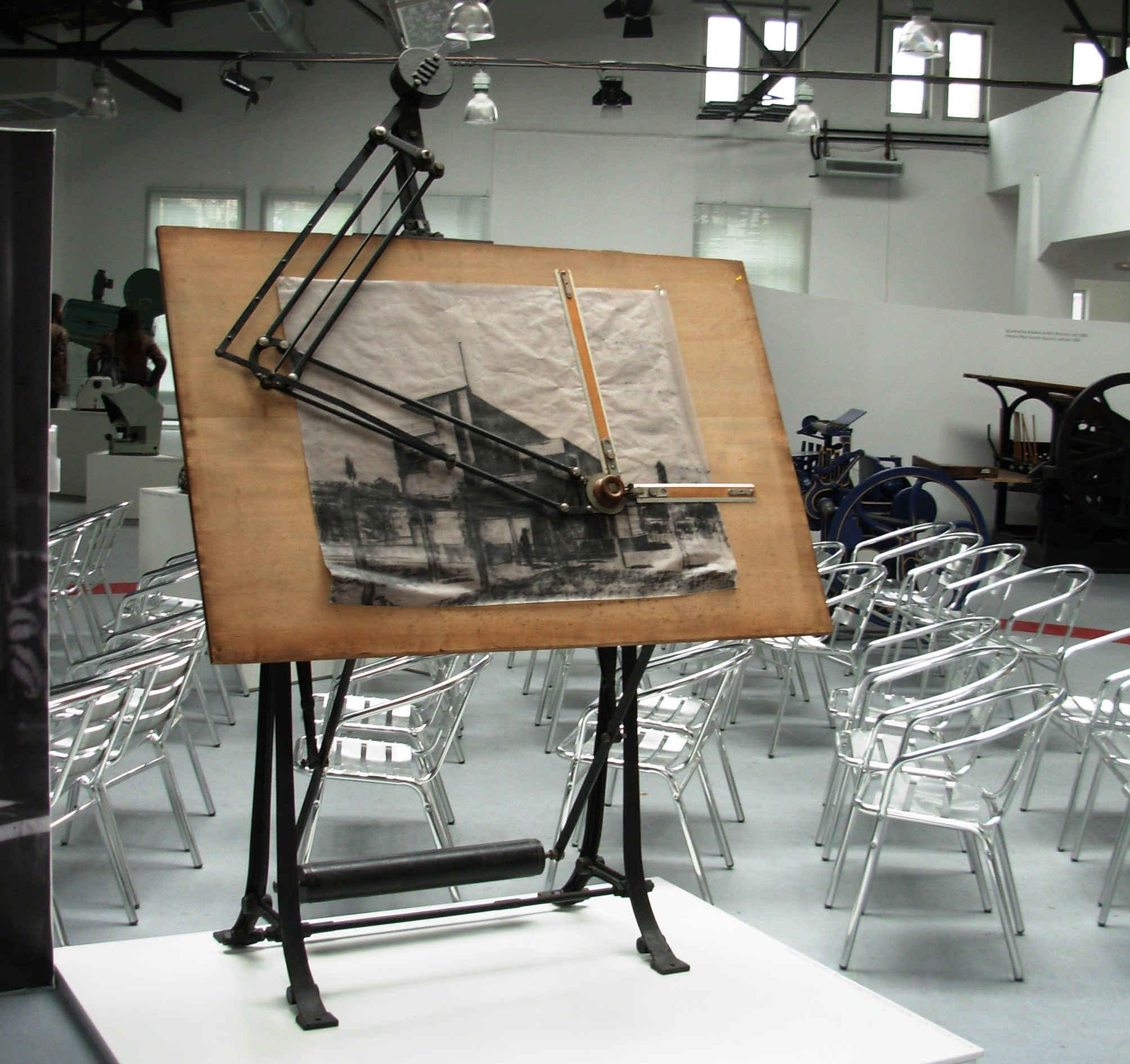 Tabla za crtanje. Tehnički muzej u Beogradu. Slikao Goldfinger